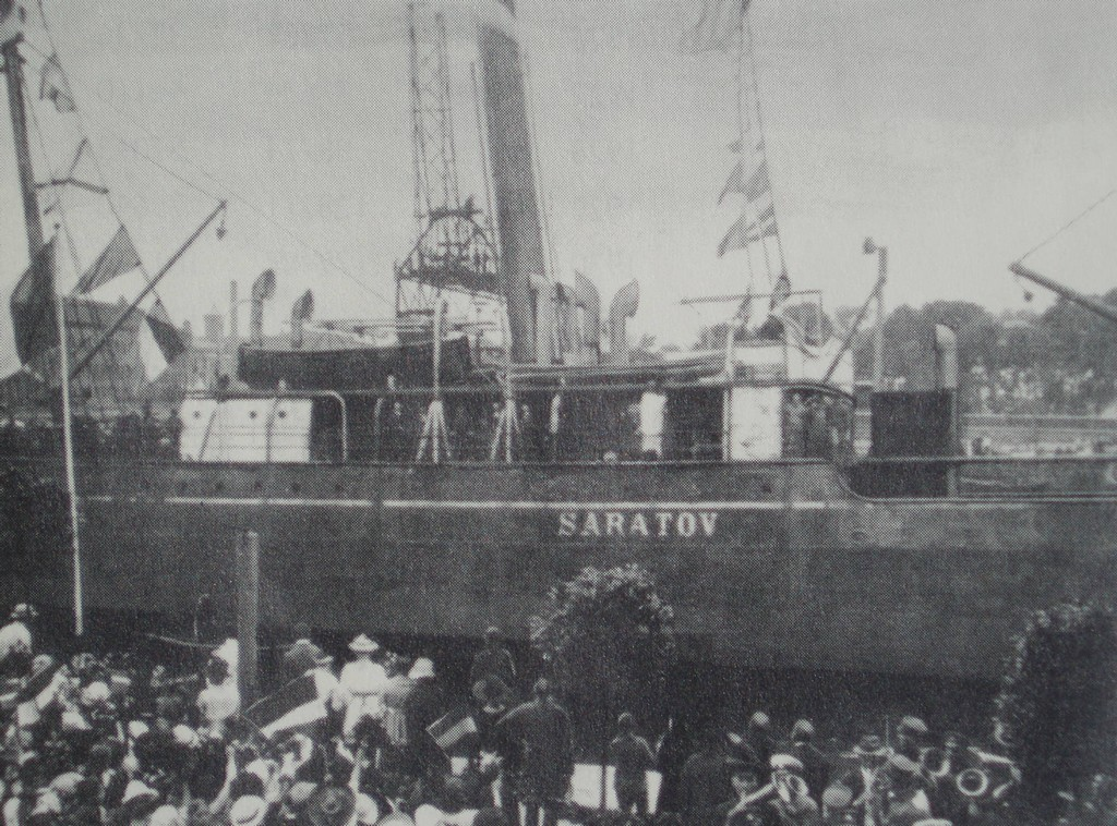 Latvijas pagaidu valdības atgriešanās Rīgā ar kuģi "Saratov", 1919. gada 8. jūlijs.